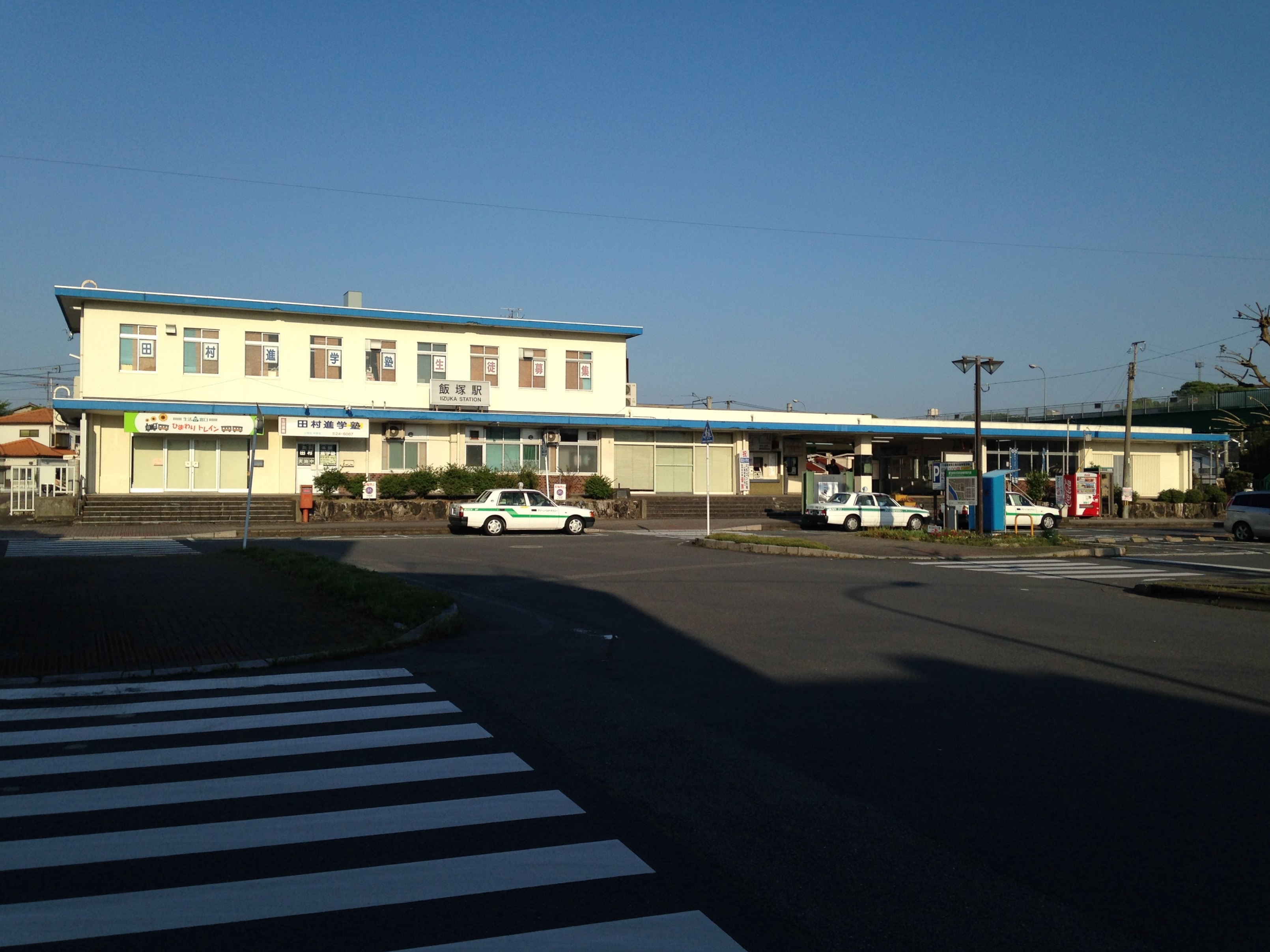 飯塚駅駅舎